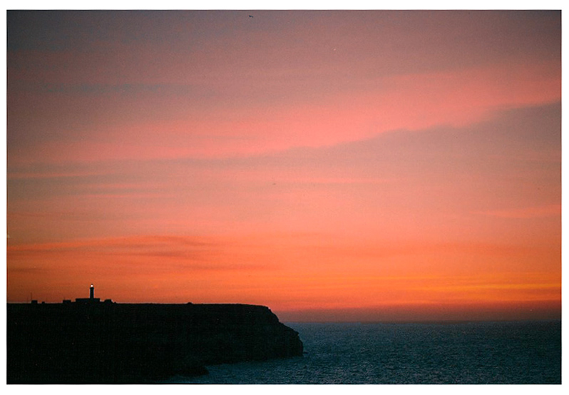 Lampedusa, Cala Grecale, 2003